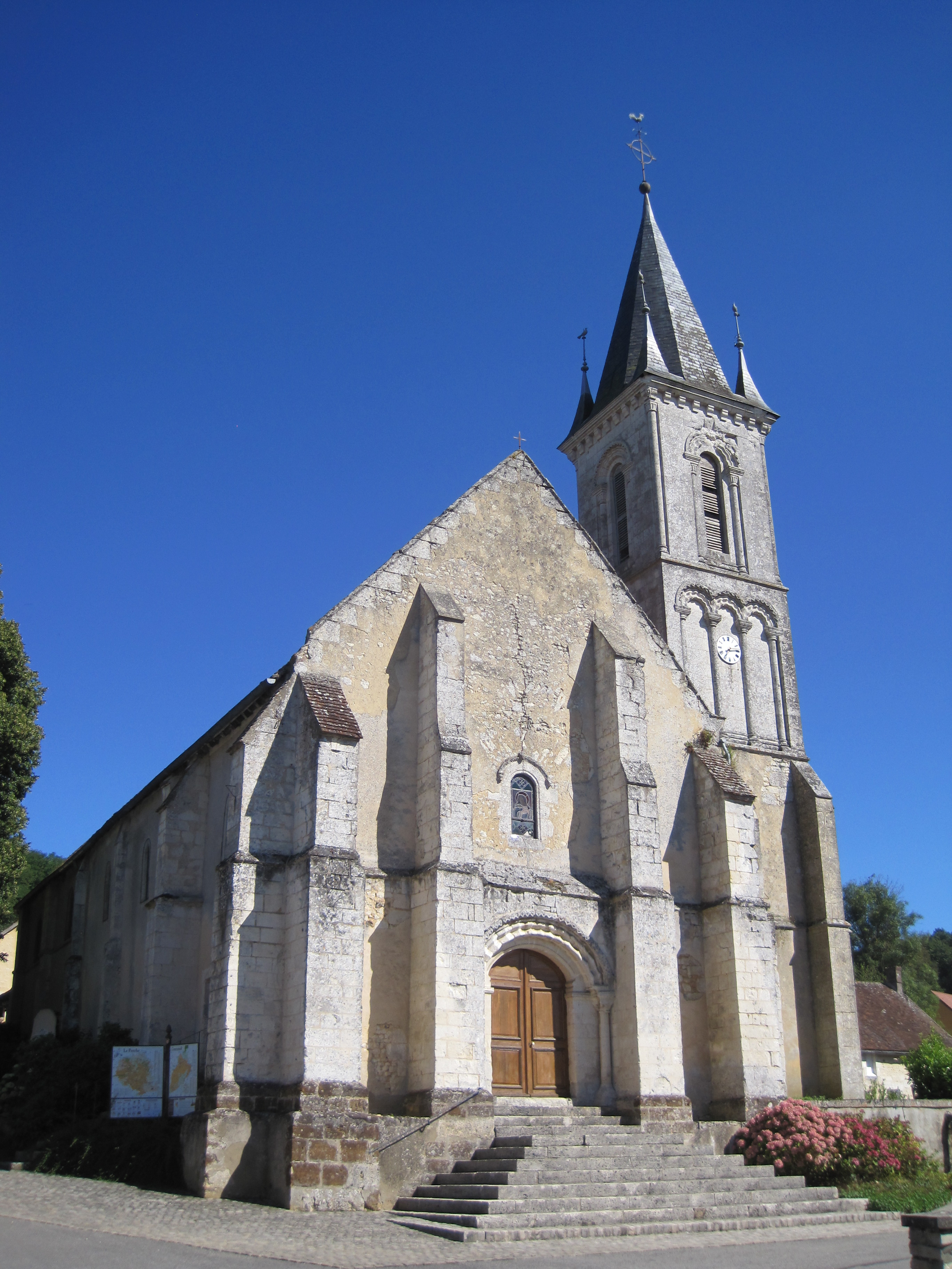 Église Saint-Pierre de Courcerault, dans l'Orne.